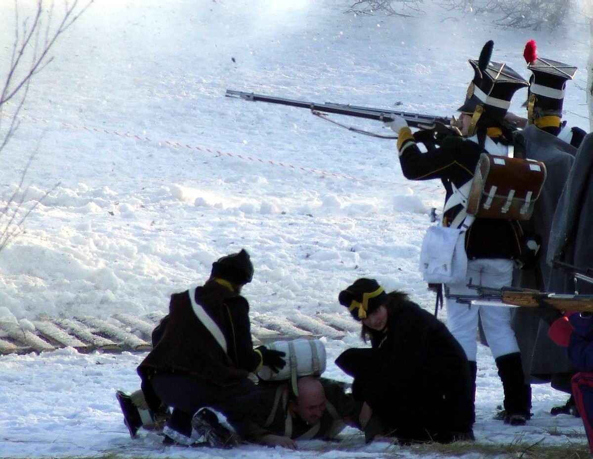 Rekonstrukcja bitwy pod Olszynką Grochowską, 2006, Warszawa, Park Skaryszewski. Woltyżer (strzelający)